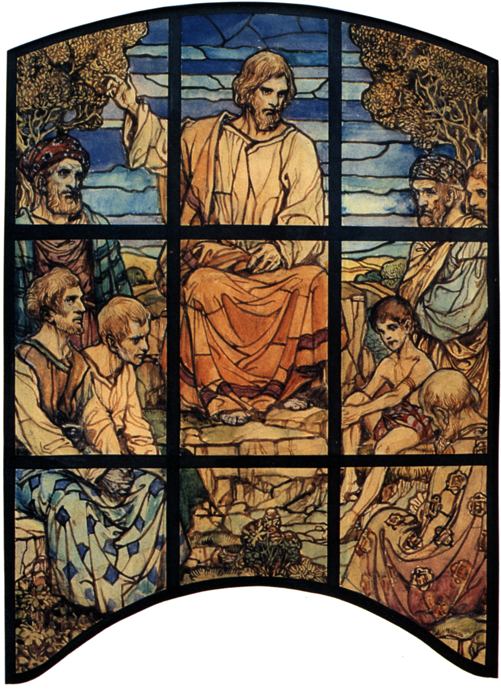 Predigender Christus, Entwurf für ein Glasfenster der Pfarrkirche in Weinheim, um 1909, von Rudolf Yelin d.Ä. (1864-1940)